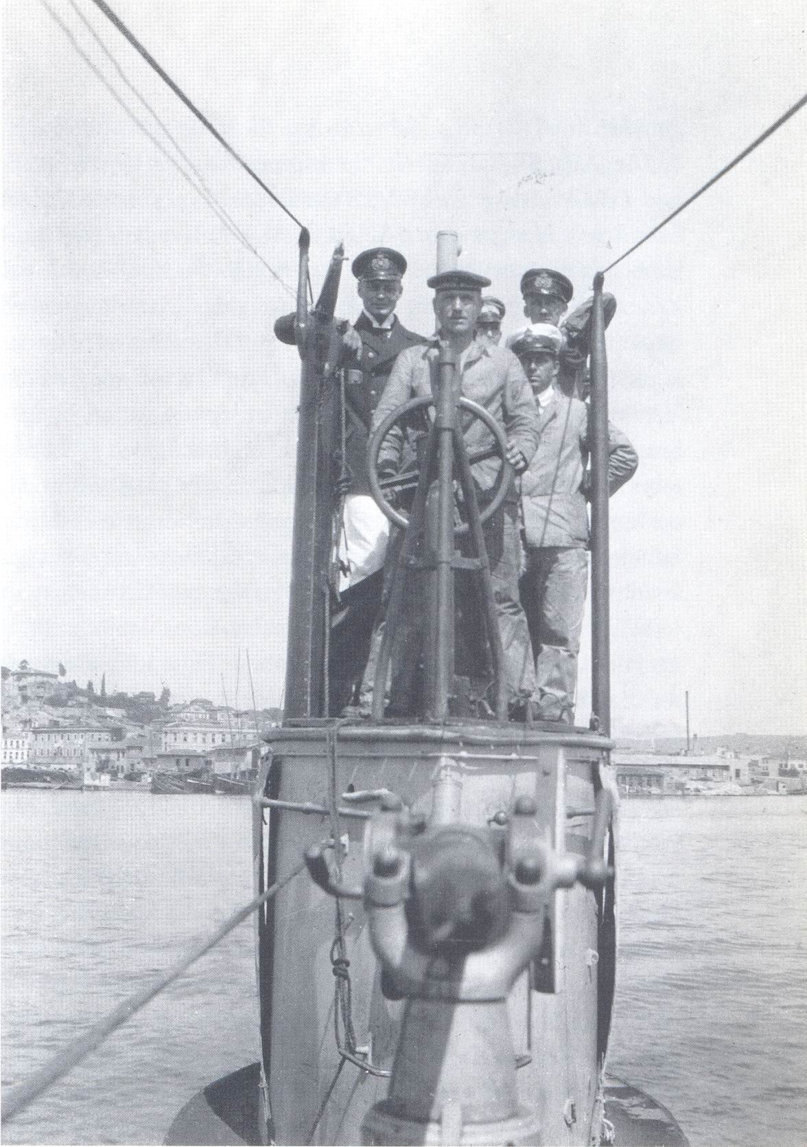 SM UB-14 im Hafen von Konstantinopel, ganz links im Bild Kommandant Kurt Schwarz